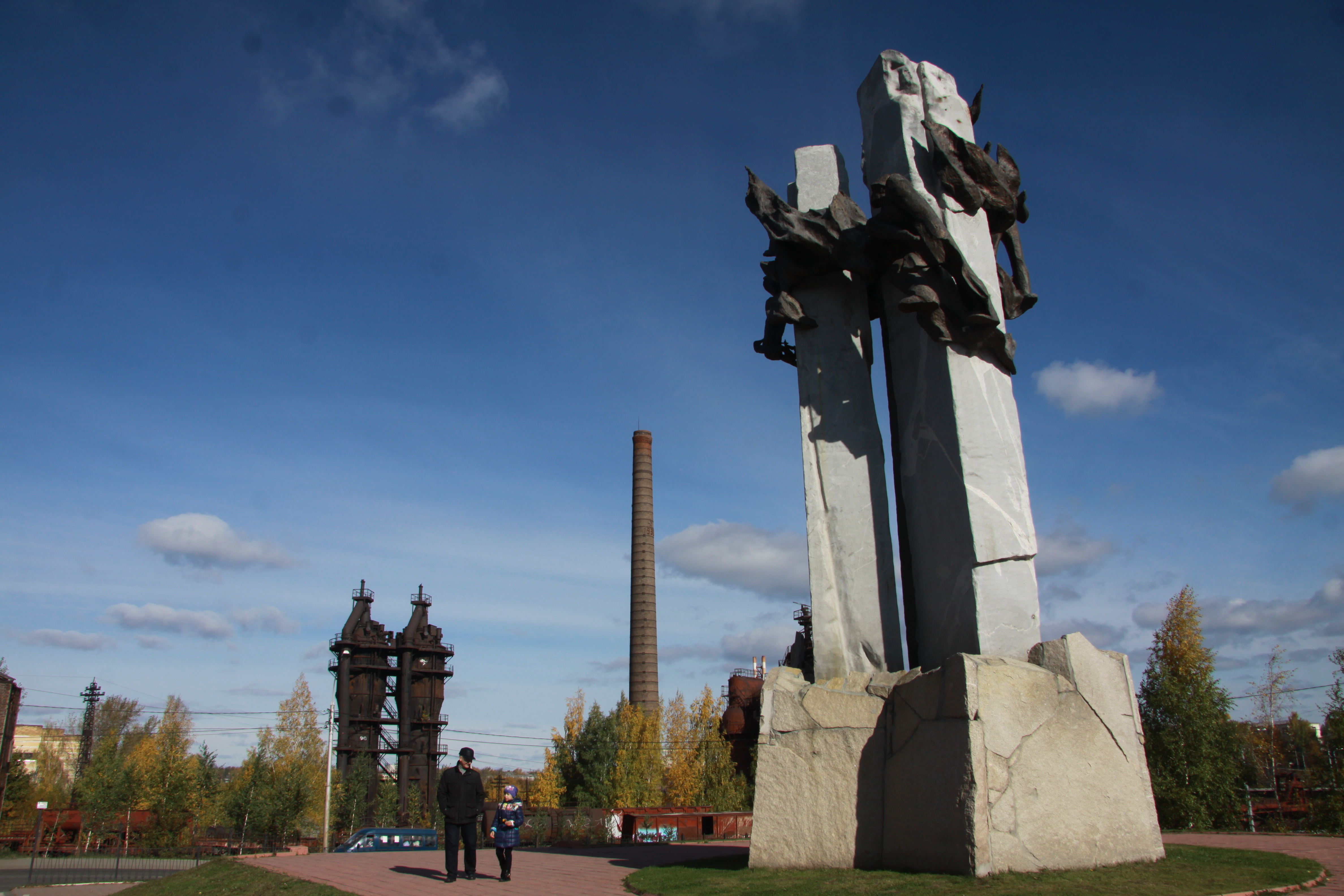 г.Нижний Тагил, памятник металлургам